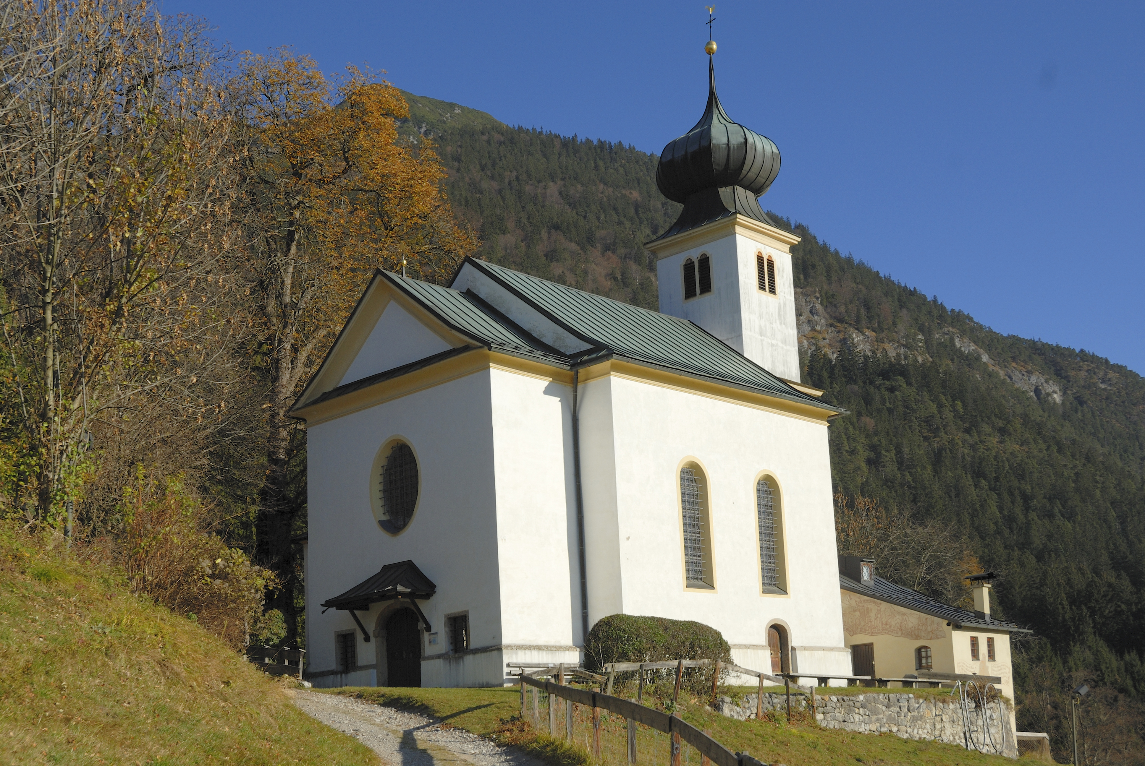 Romediuskirche (Schlosskirche) in Thaur